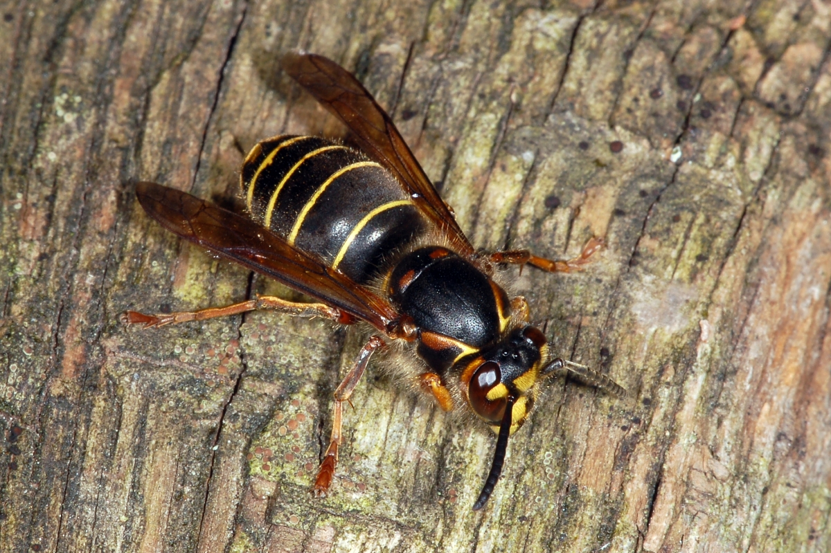 Dolichovespula media, Frankfurt am Main, Hessen, Deutschland